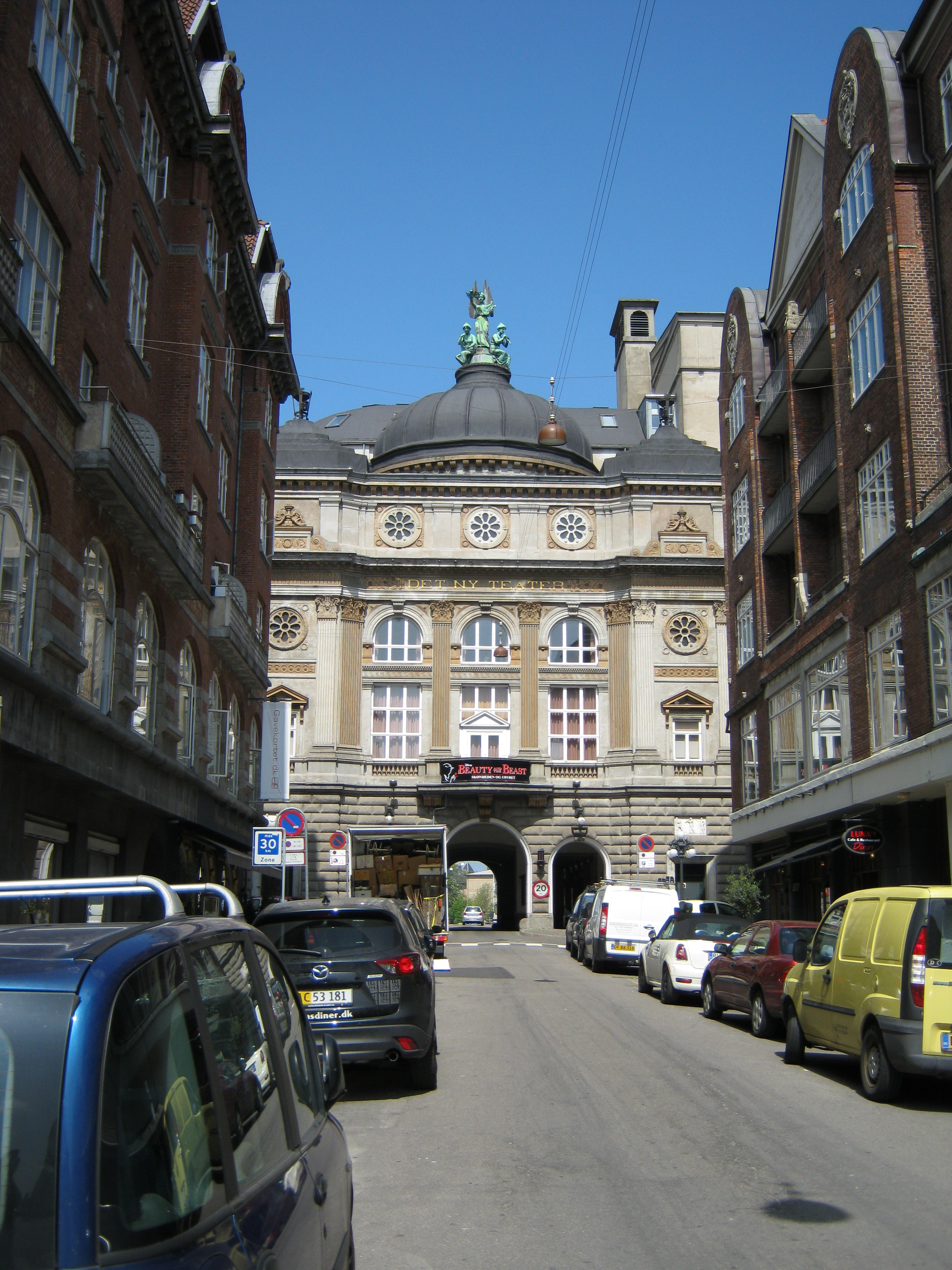 Det Ny Teater in Copenhagen, Denmark